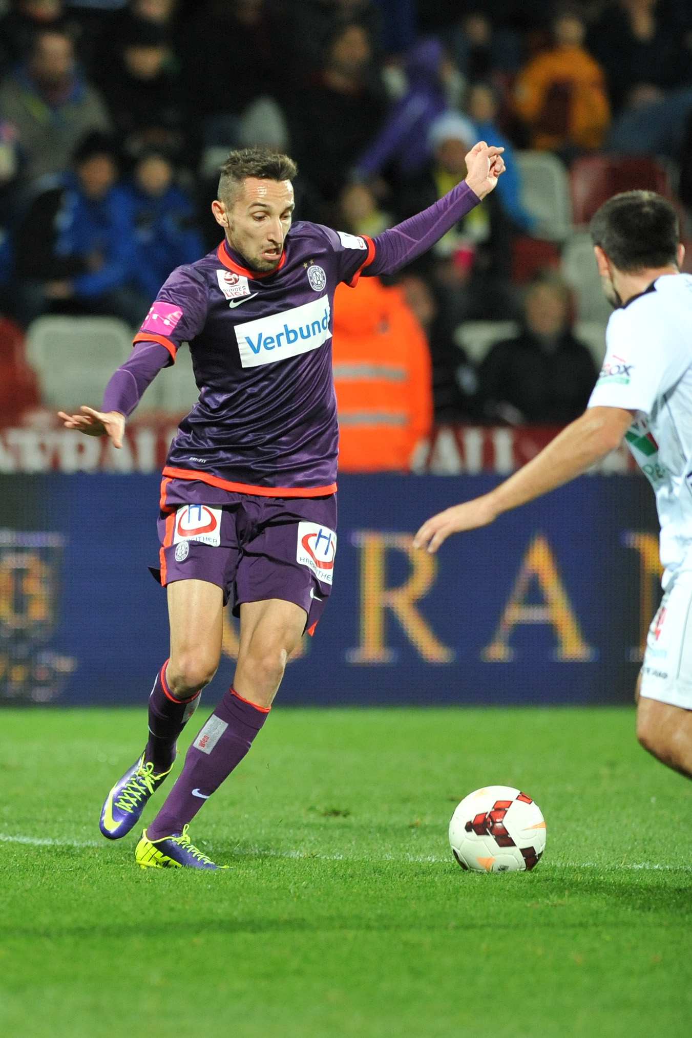 Bundesliga:FK Austria Wien - RZ Pellets WAC Marin Leovac